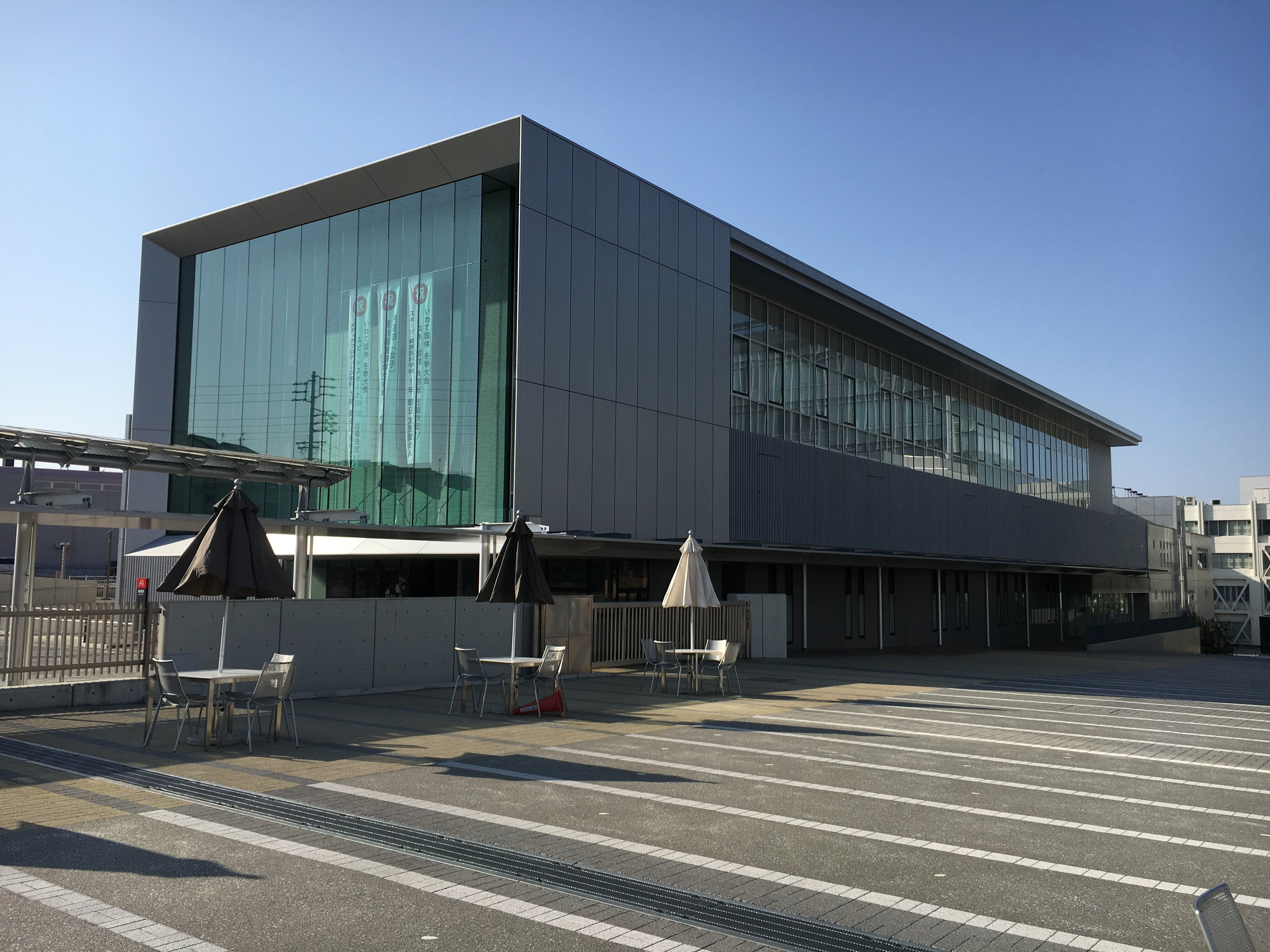 愛知淑徳大学 健康・医療・教育センター（AHSMEC／アースメック）